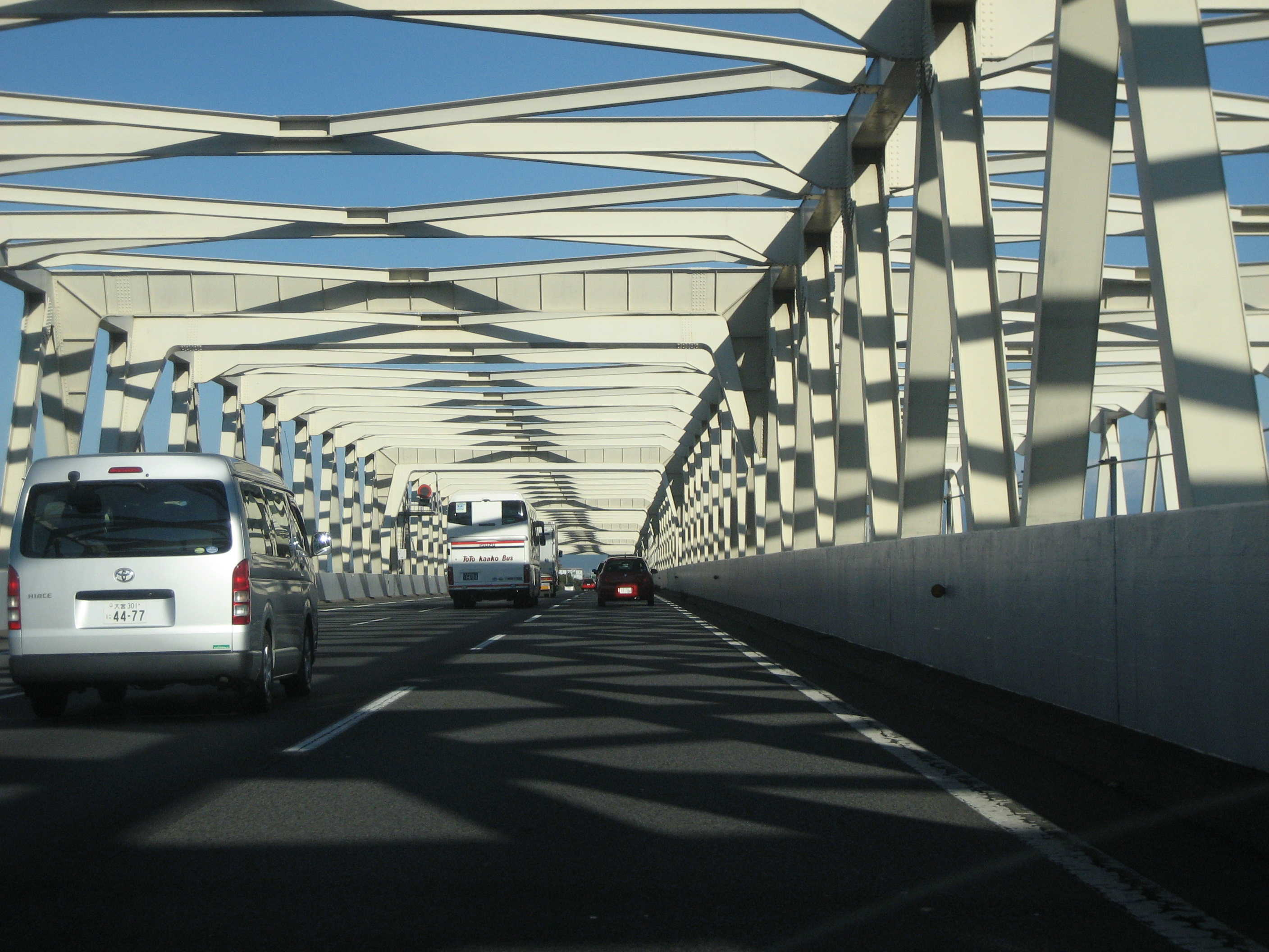 東北道利根川橋